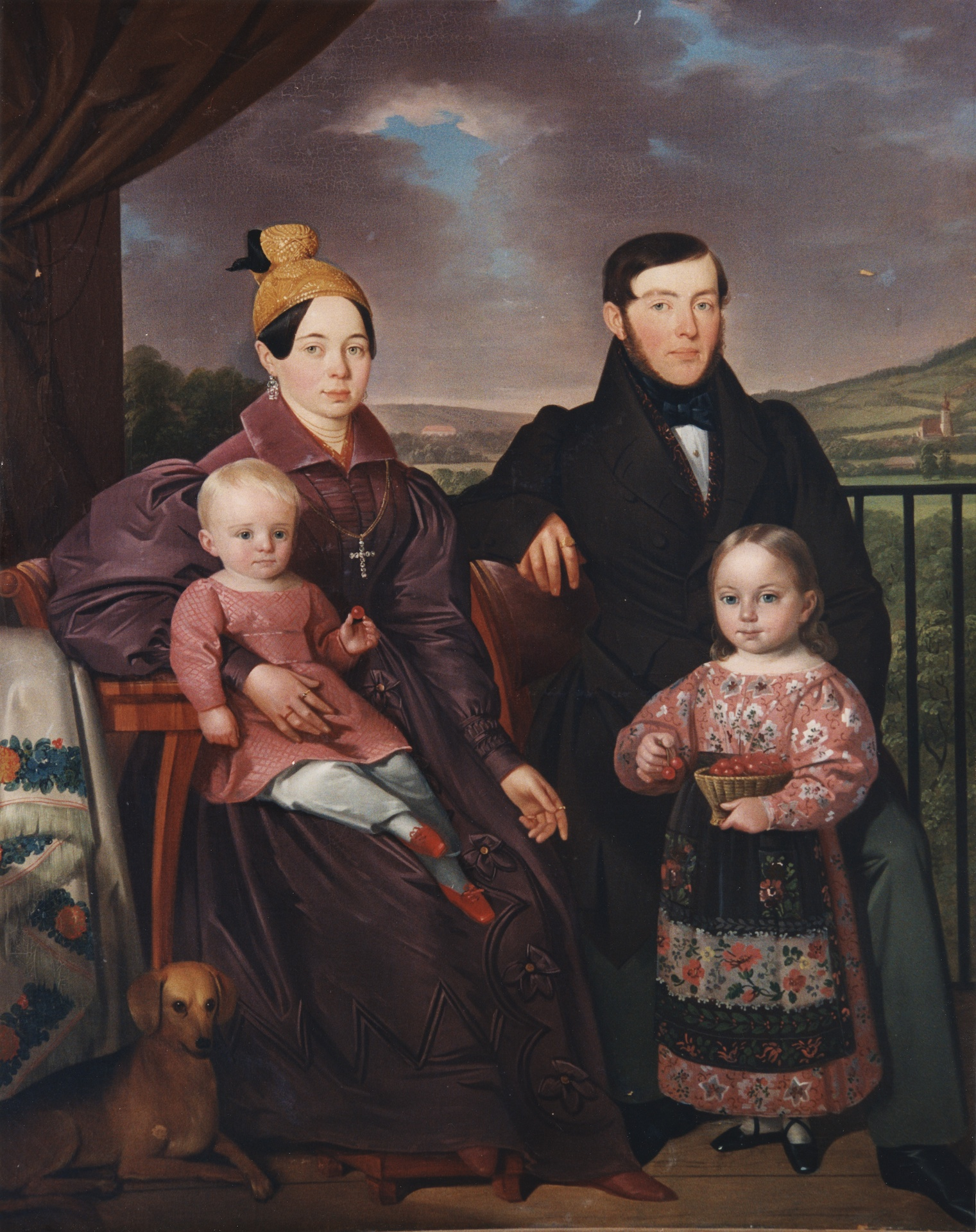 Sensengewerke Christoph Conrad Weinmeister am Windfeld mit Frau Josefa Serafina Weinmeister, geb. Moser und Kindern Carl und Theresia, um 1838